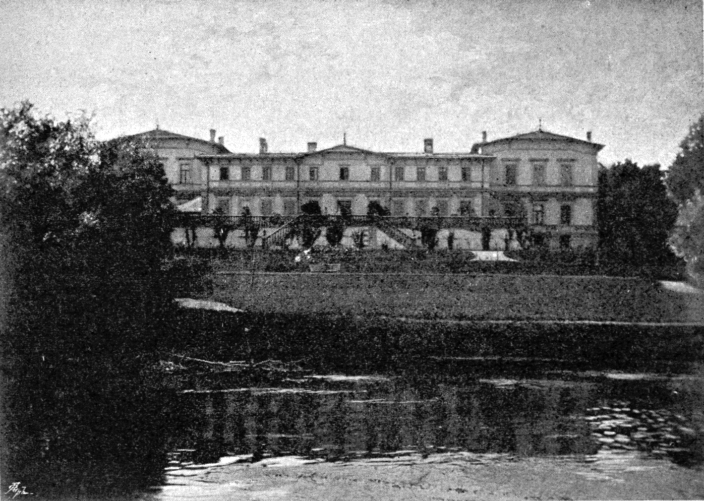 Беларуская (тарашкевіца): Навасёлкі (Navasiołki), сядзіба Чапскіх (Čapski)